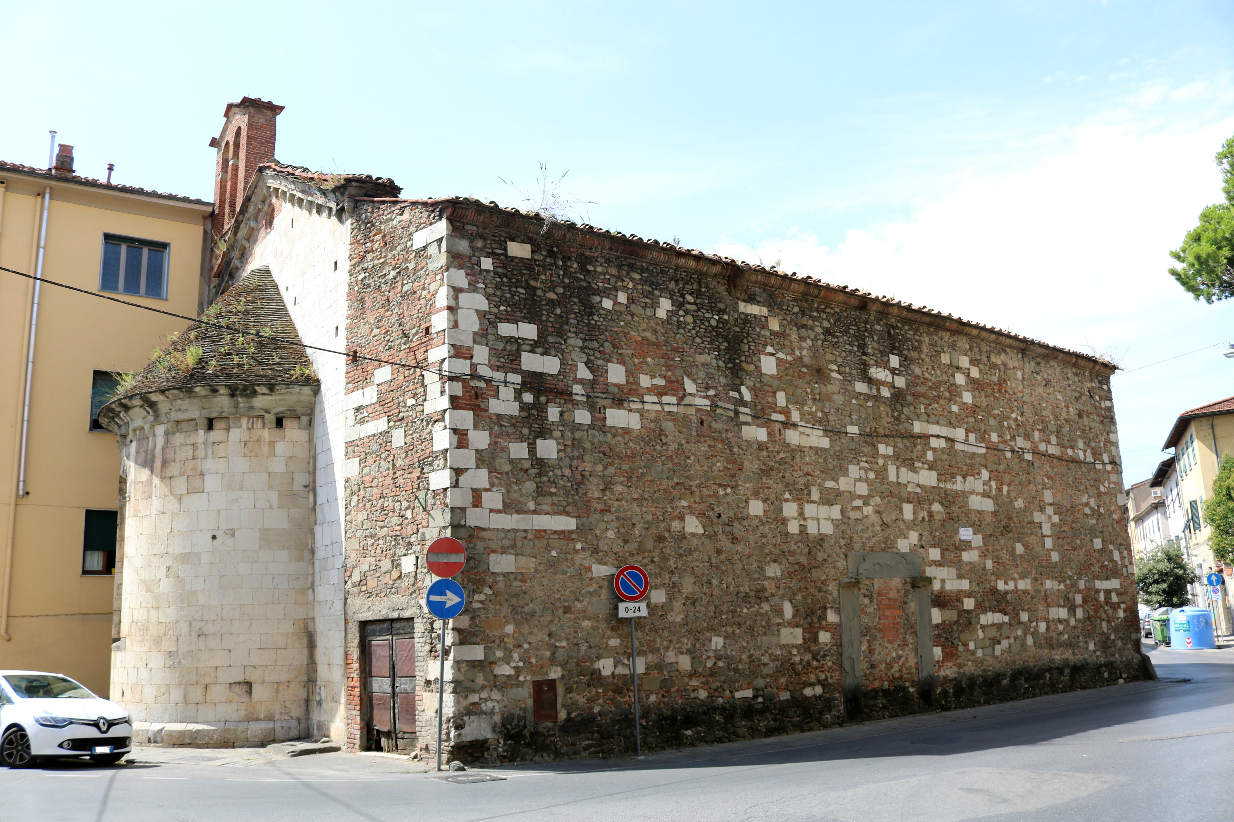 Ex Chiesa di Santa Maria Nuova (Pistoia)